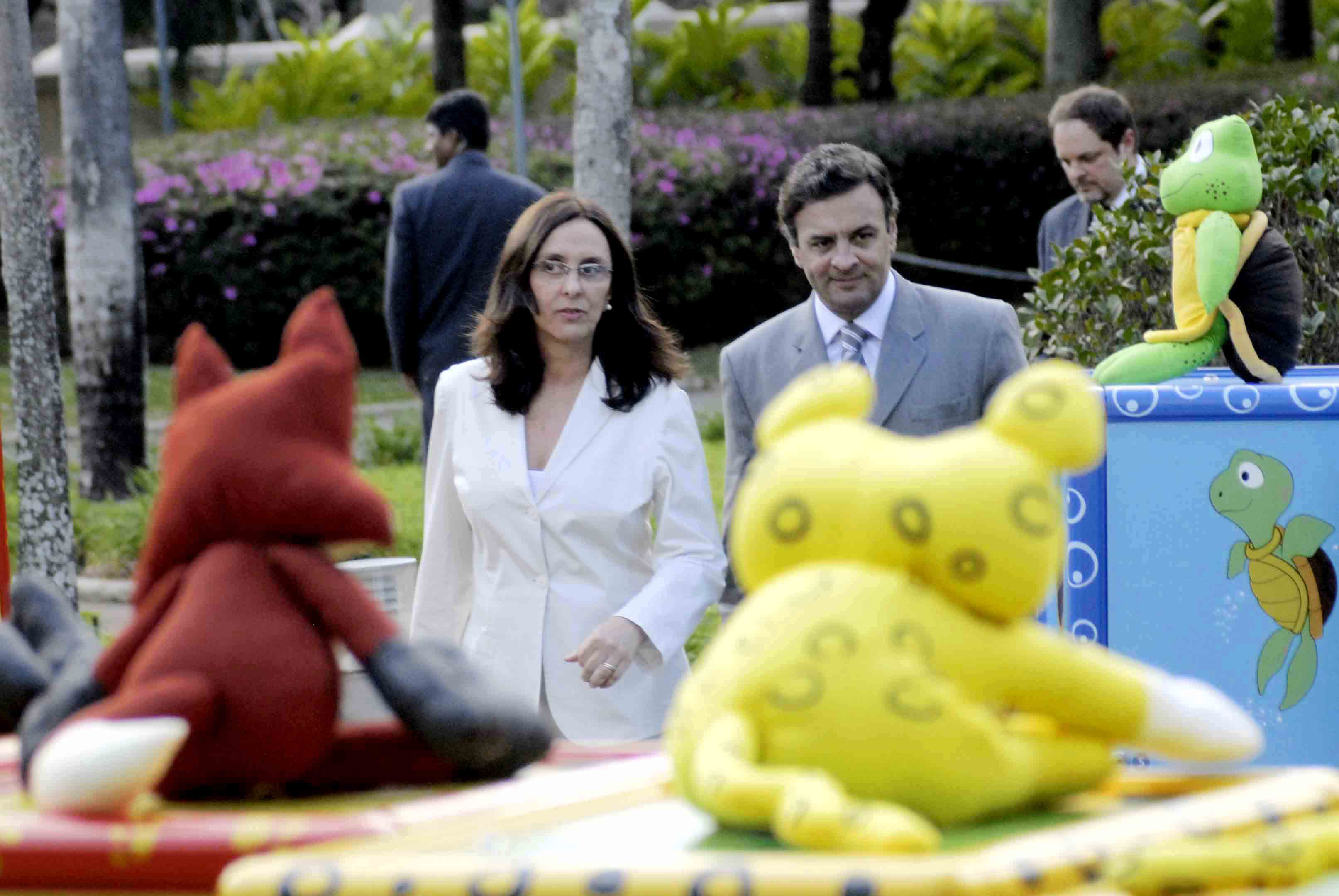 Aécio Neves e a irmã Andréa Neves da Cunha em 17 de agosto de 2009.